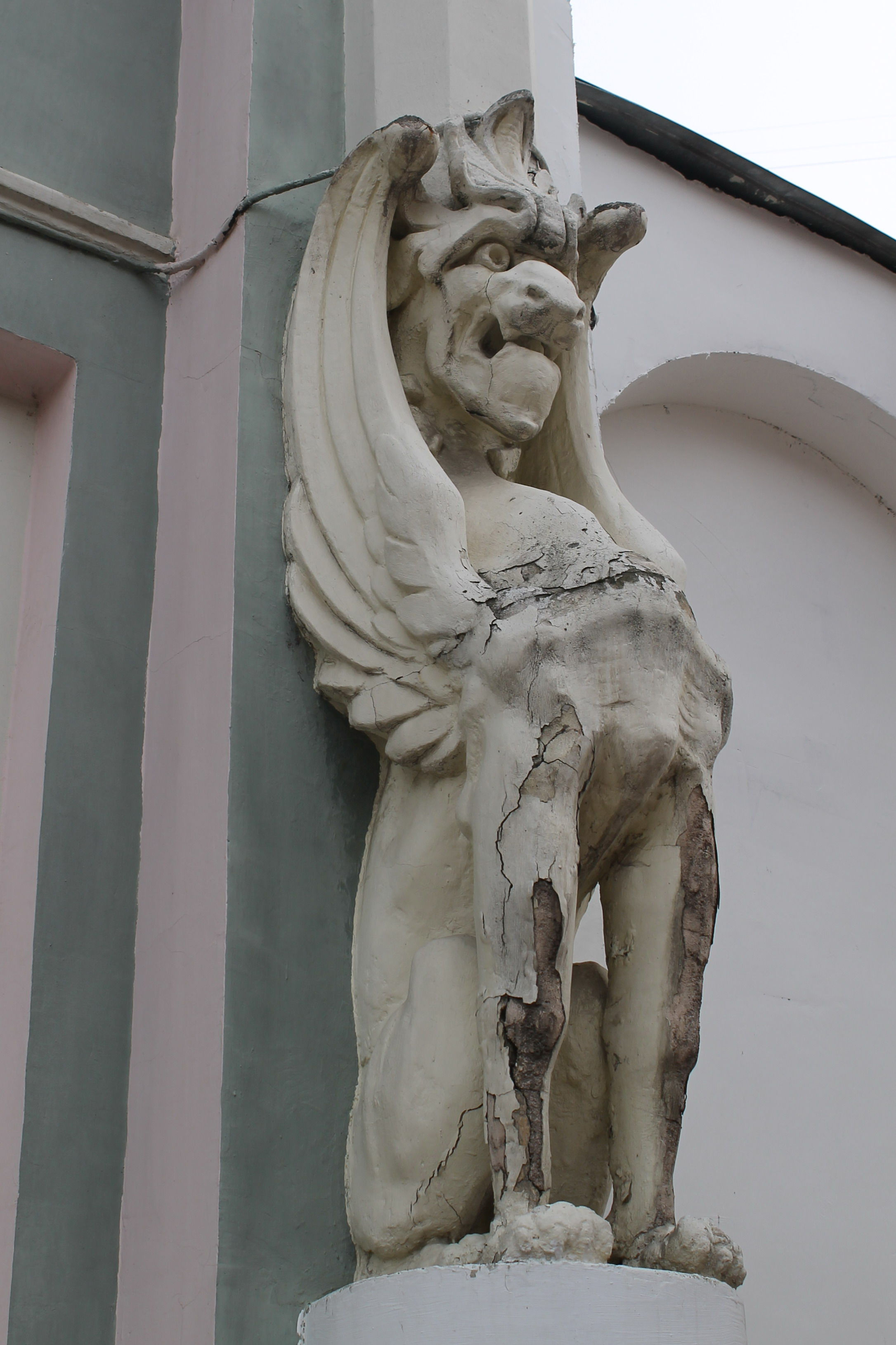 Торговый корпус А. К. Каменевой: улица Большая Покровская, 38, Нижний Новгород, Нижегородская область